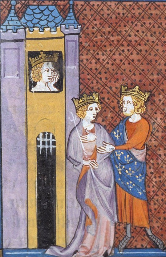 Filip I. a jeho ženy